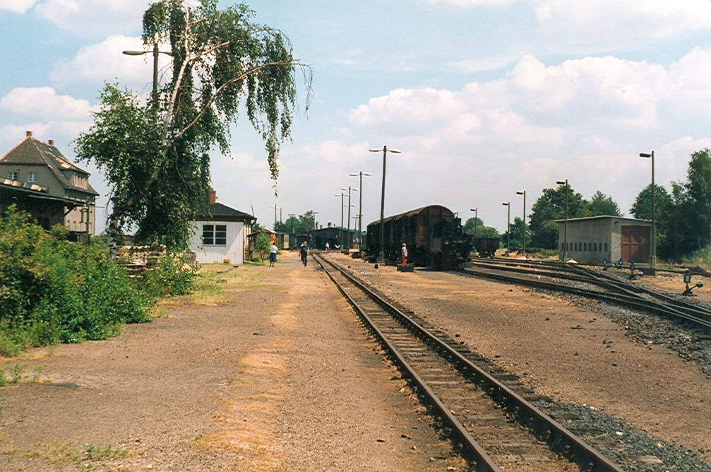 Güterzug aus Oschatz in der Rangiergruppe des Bahnhofs Mügeln